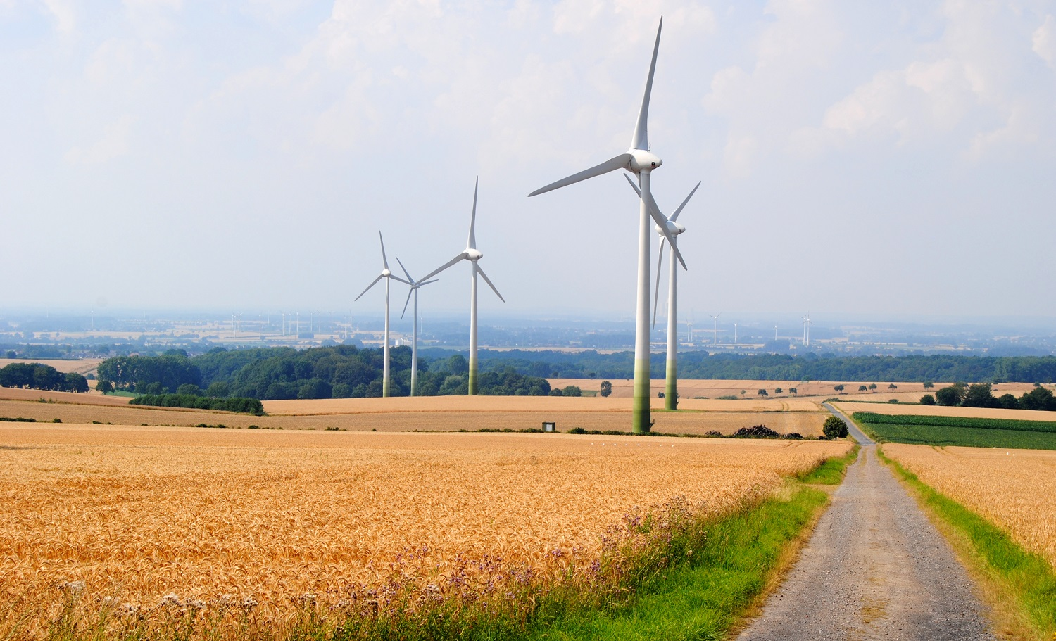 Vėjo jėgainės prie Mionės ežero